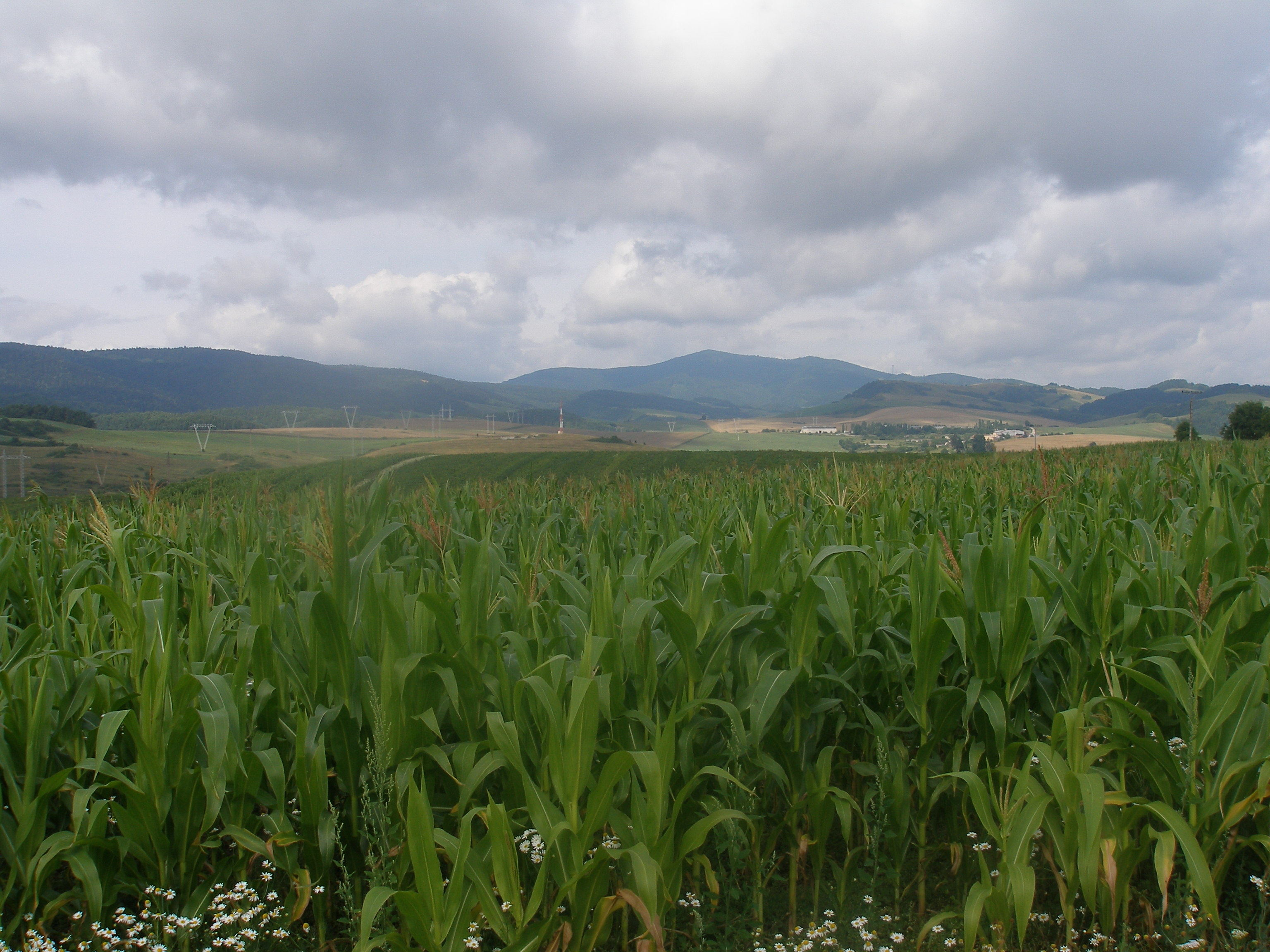 Pohorie Čierna hora- pohľad od Sedlíc